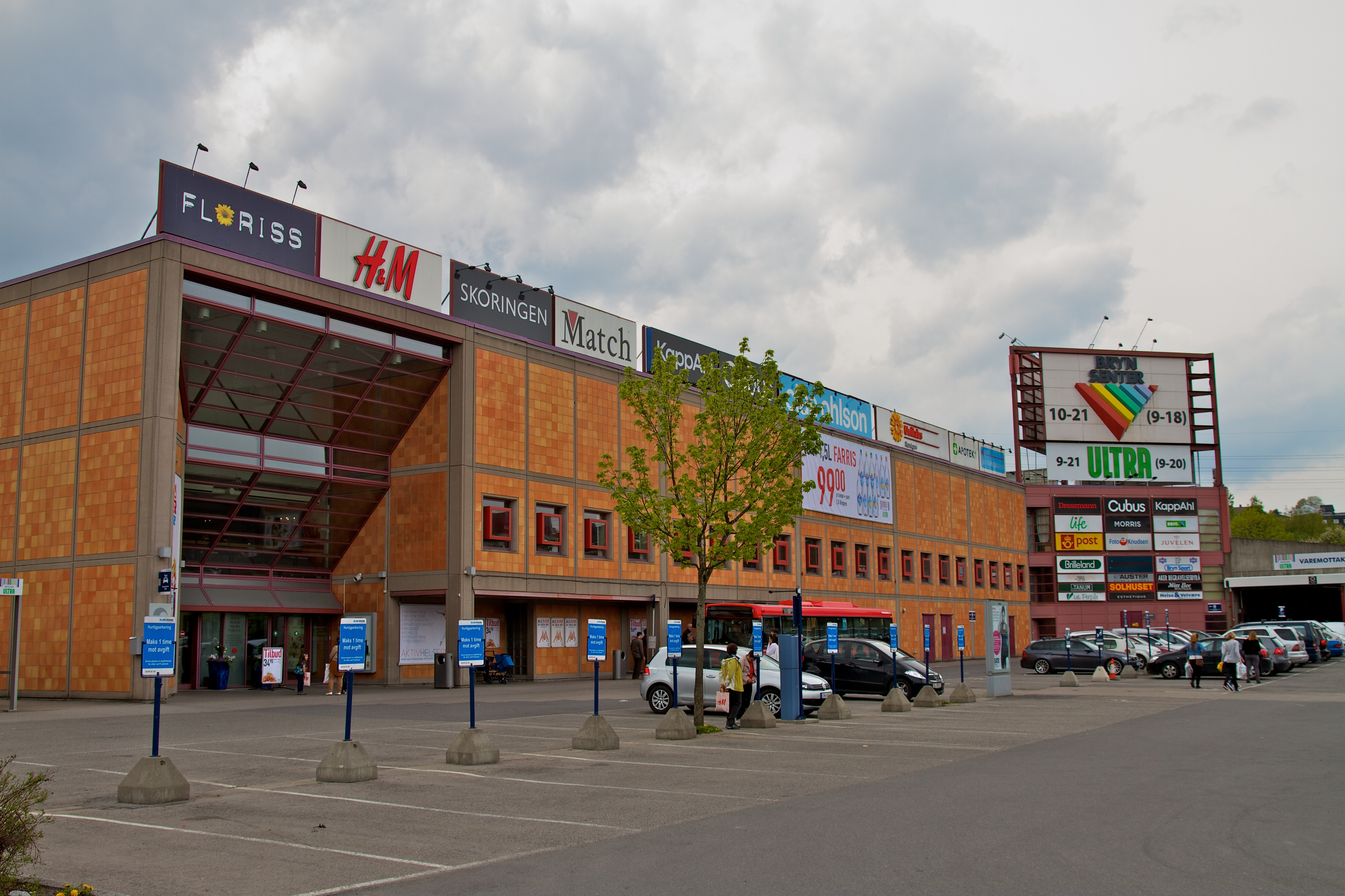 Brynsenteret i bydel Østensjø i Oslo.